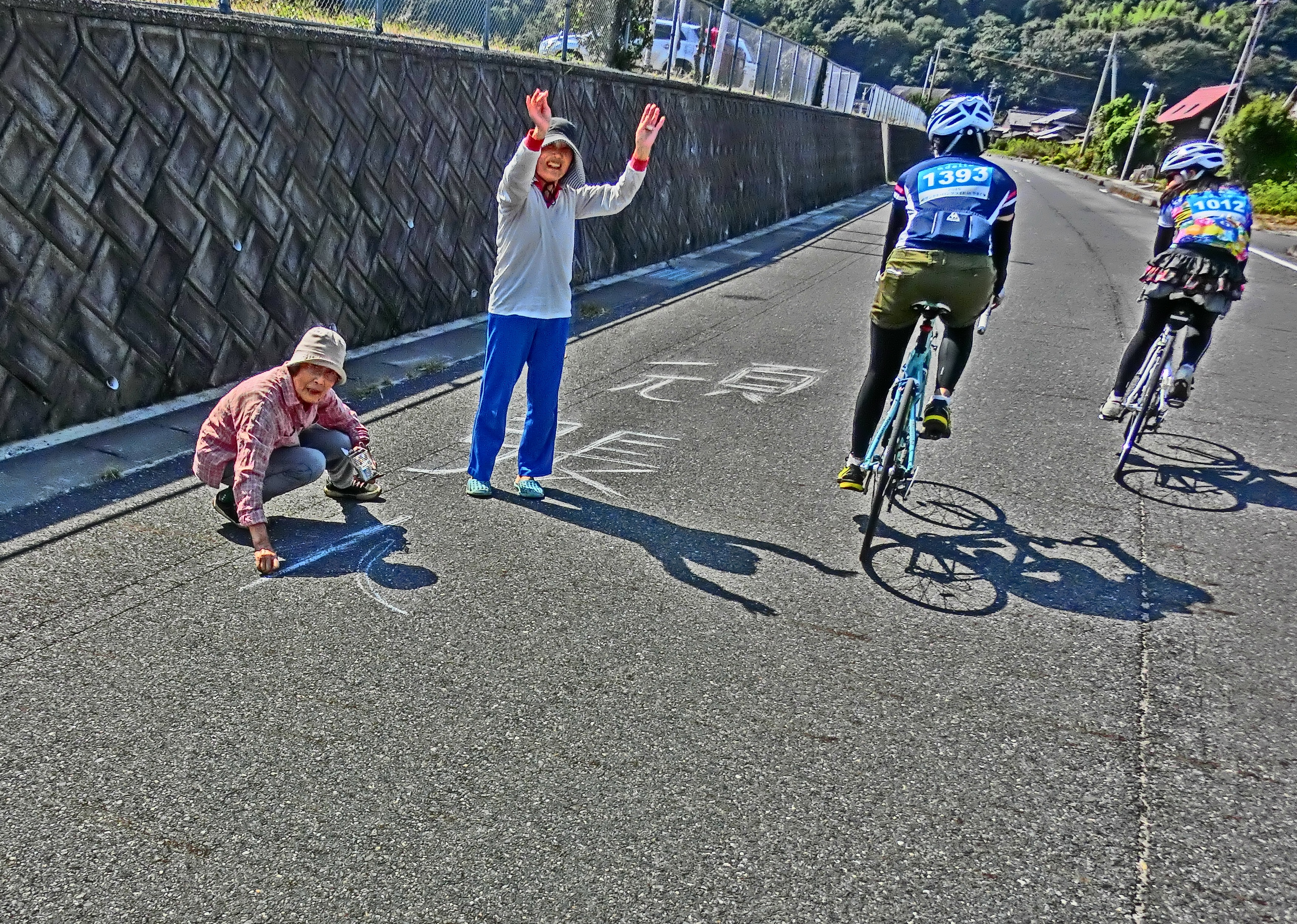 サザンセト・ロングライドinやまぐち2015年でのひとコマ 路面にメッセージを書いて応援してくれる地元の方々。山口県柳井市周防大島